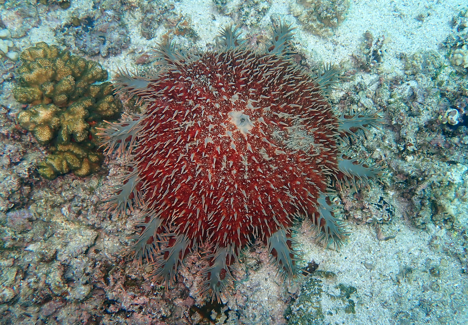 Acanthaster planci ellisi (forme locale parfois considérée comme une sous-espèce) observée dans le Golfe de Californie.